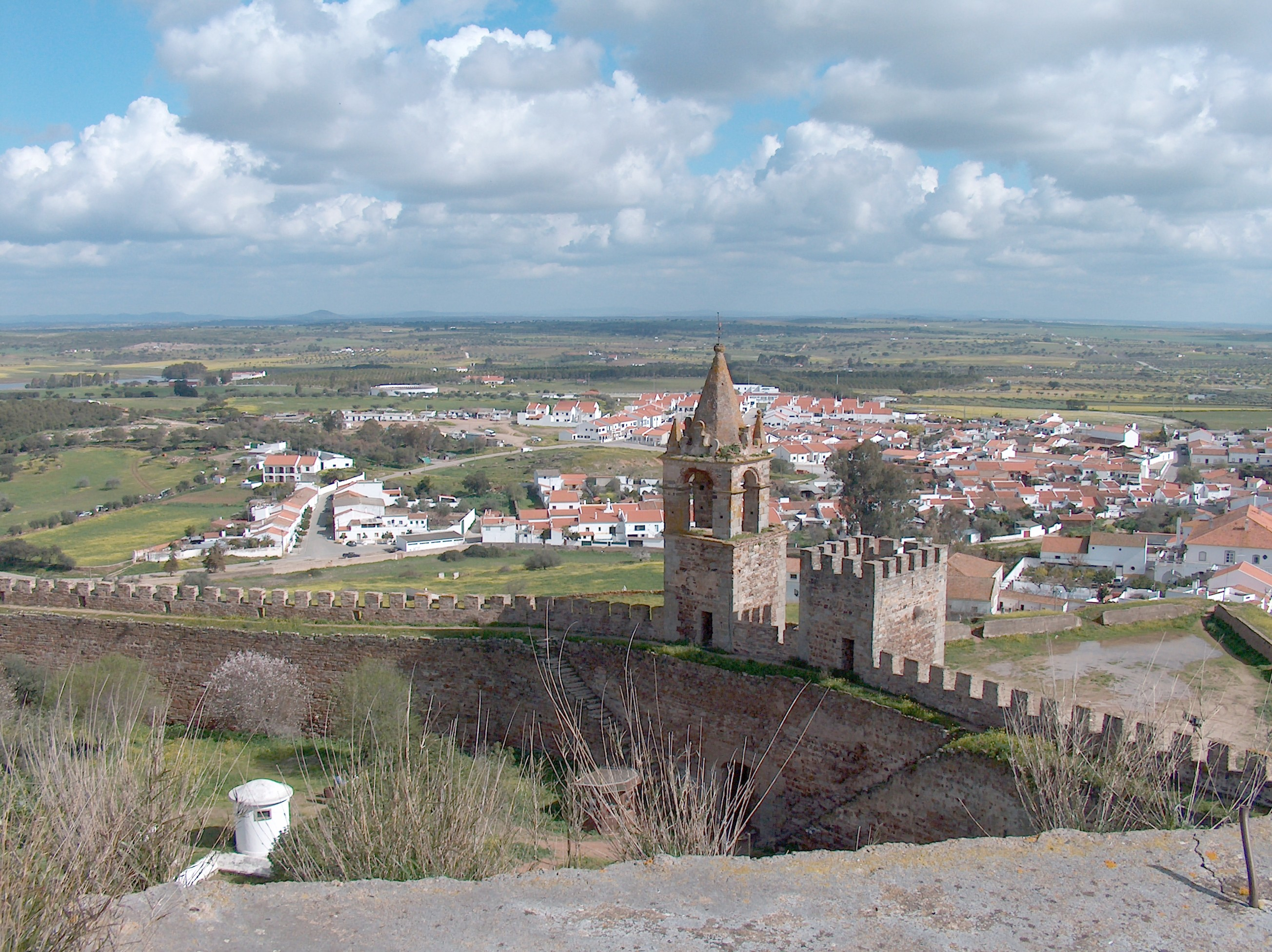 Castelo de Mourão,(freguesia e concelho de Mourão, distrito de Évora).